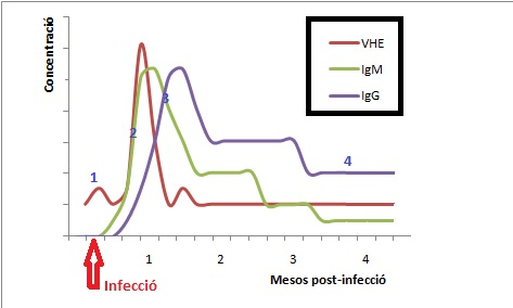 Detecció d'IgM i IgG en serum o plama